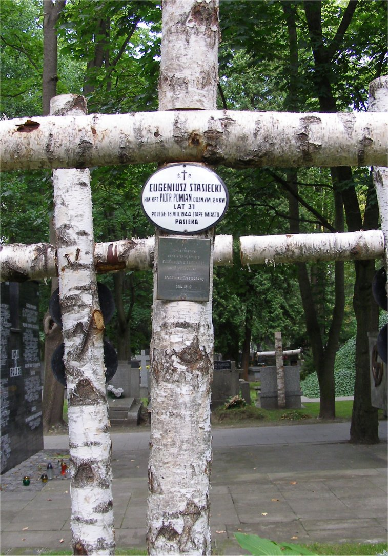 Grób Eugeniusza Stasieckiego na Powązkach wojskowych w Warszawie (fot Zu)